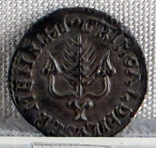 Palazzo Massimo alle Terme